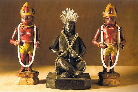 Ibejis e Iemanjá, século XIX (19th century), fundo editado (edited background) - Acervo do Museu Afro Brasil, São Paulo.